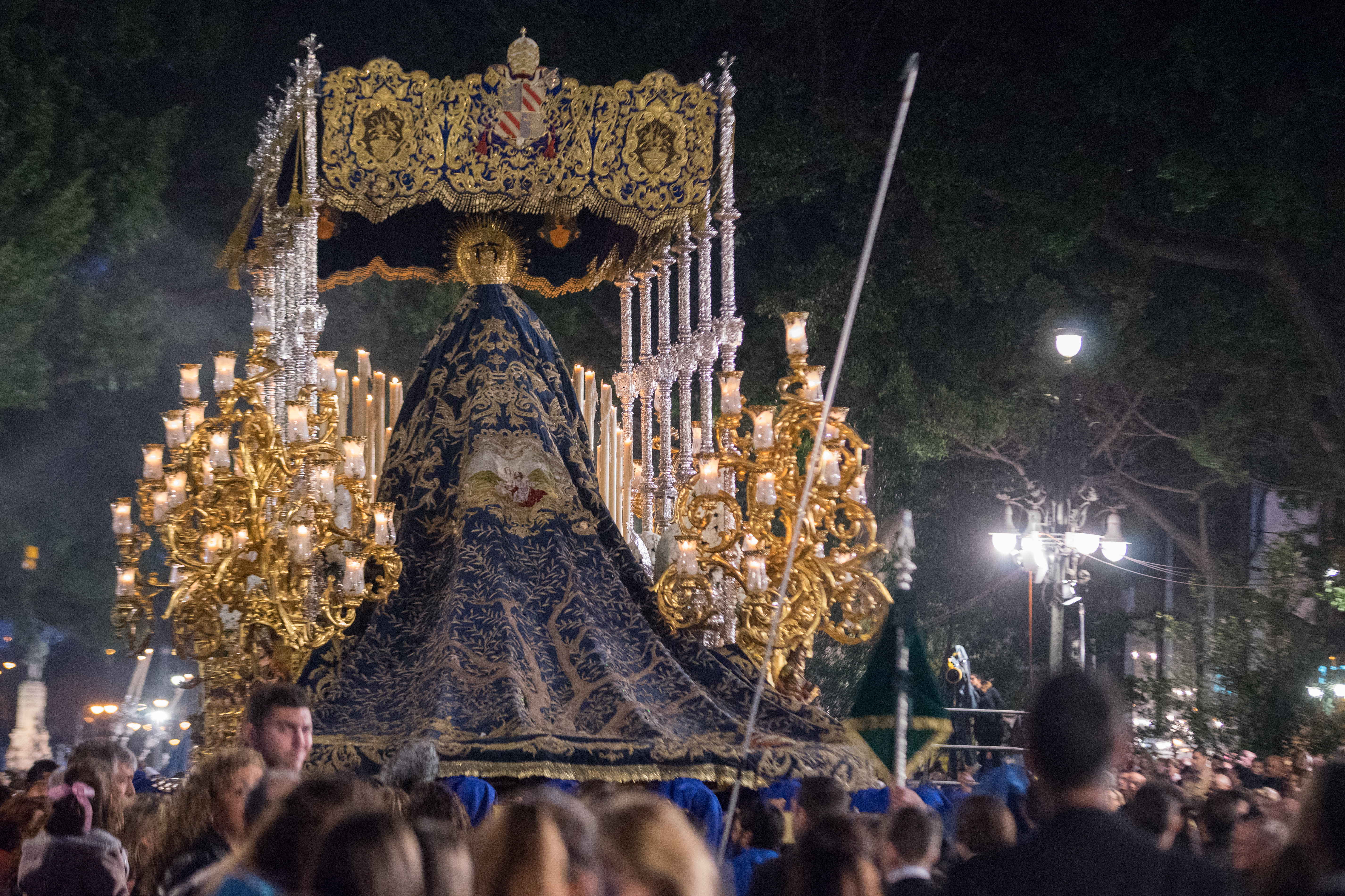 Manto del Trono de la Concepción de la Pontificia, Muy Ilustre y Venerable Archicofradía Sacramental y Seráfica de Nuestro Padre Jesús Orando en el Huerto, Nuestra Señora de la Concepción, San Juan Evangelista y Nuestra Señora de la Oliva This is a photography of a Folklore festival in Spain (Wikidata id Q9075883).